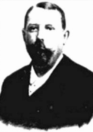 Alfons Oscar Saligny (n. 3 aprilie 1853, Focșani - d. 4 mai 1903, București)